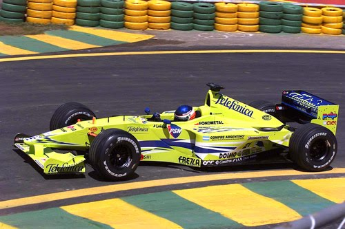 Gaston Mazzacane corriendo para el equipo Minardi de Formula 1 el año 2000